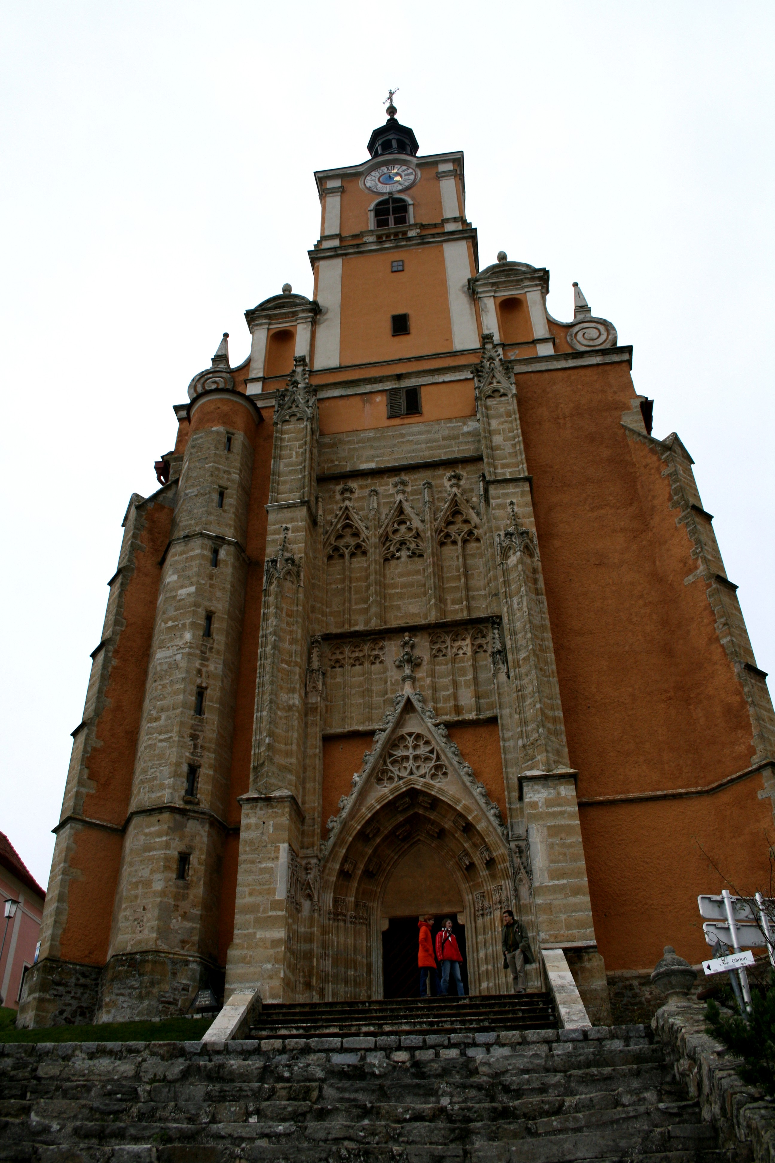 Österreich,Steiermark: Wallfahrtskirche Maria Pöllauberg